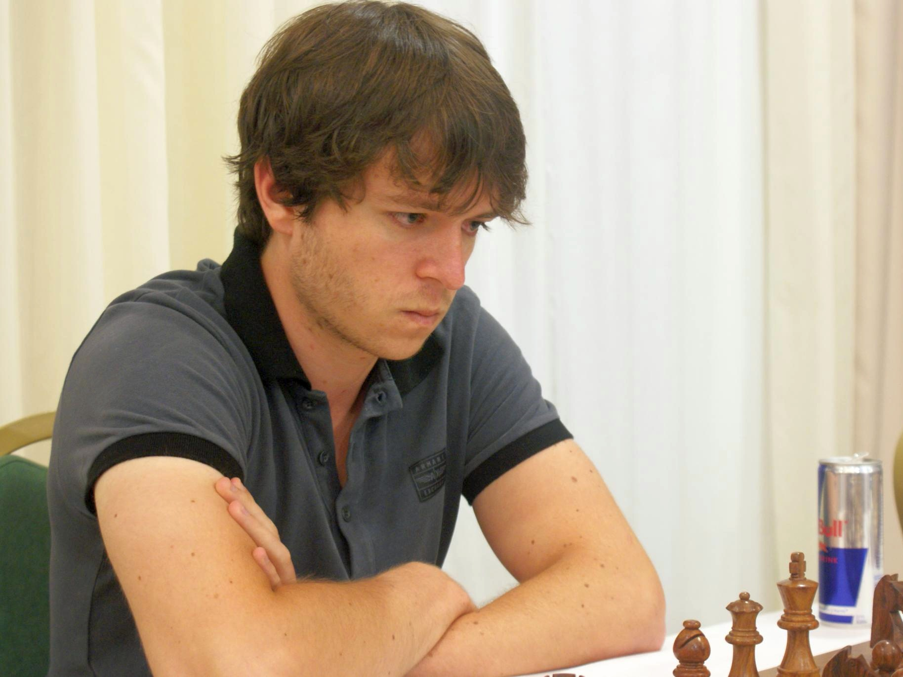 GM Maxim Rodshtein, 31è Open Internacional d'Andorra, Hotel Sant Gothard, Ronda 9 - 28/7/2013